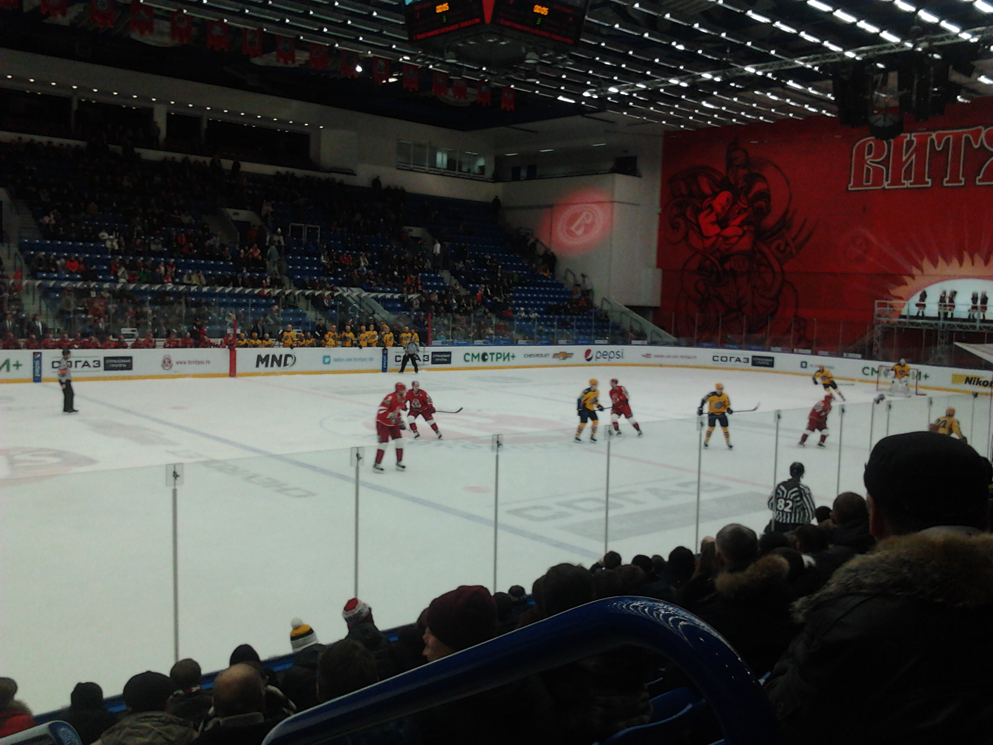 Хоккейный матч